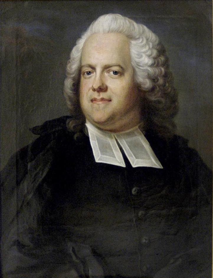 Biskop Lars Benzelstierna avporträtterad i prästrock. Pastell av Gustaf Lundberg ca 1770.